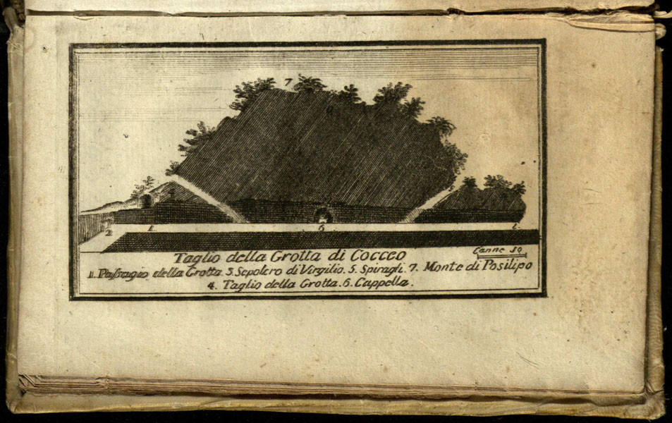 La Grotta di Cocceio nei pressi di Cuma Note: This description has been identified as biased or incorrect: regardless the name "Grotta di Cocceo", all the references in the diagram are related to the Crypta Neapolitana under Posillipo, in the Vergilian park.